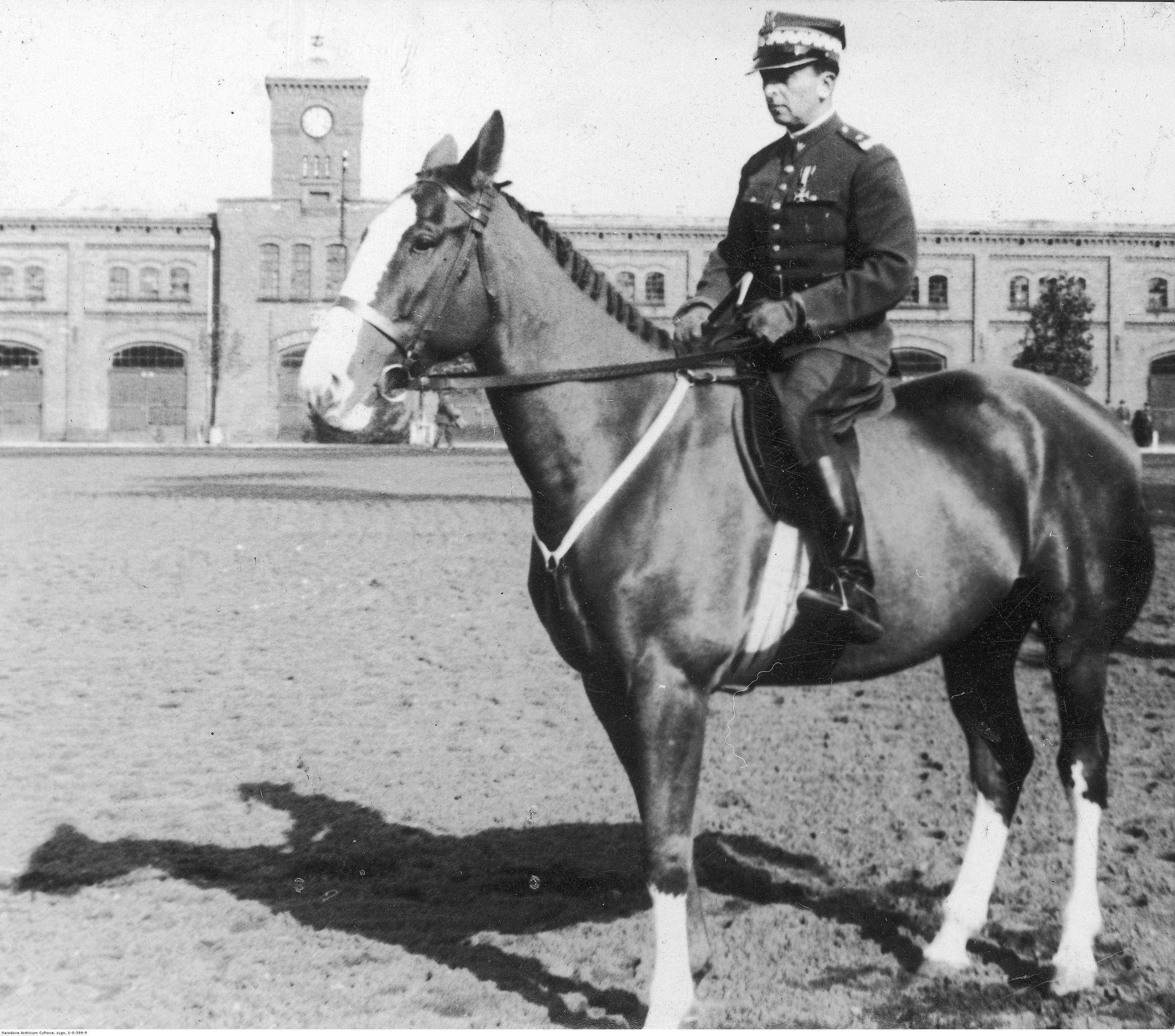 VIII Jeździeckie Mistrzostwa Polski w Bydgoszczy; październik 1938. Uczestnik biegu myśliwskiego rozegranego w ramach jeździeckich mistrzostw Polski gen. bryg. Stanisław Grzmot-Skotnicki. Koncern Ilustrowany Kurier Codzienny - Archiwum Ilustracji. Sygnatura: 1-S-399-9